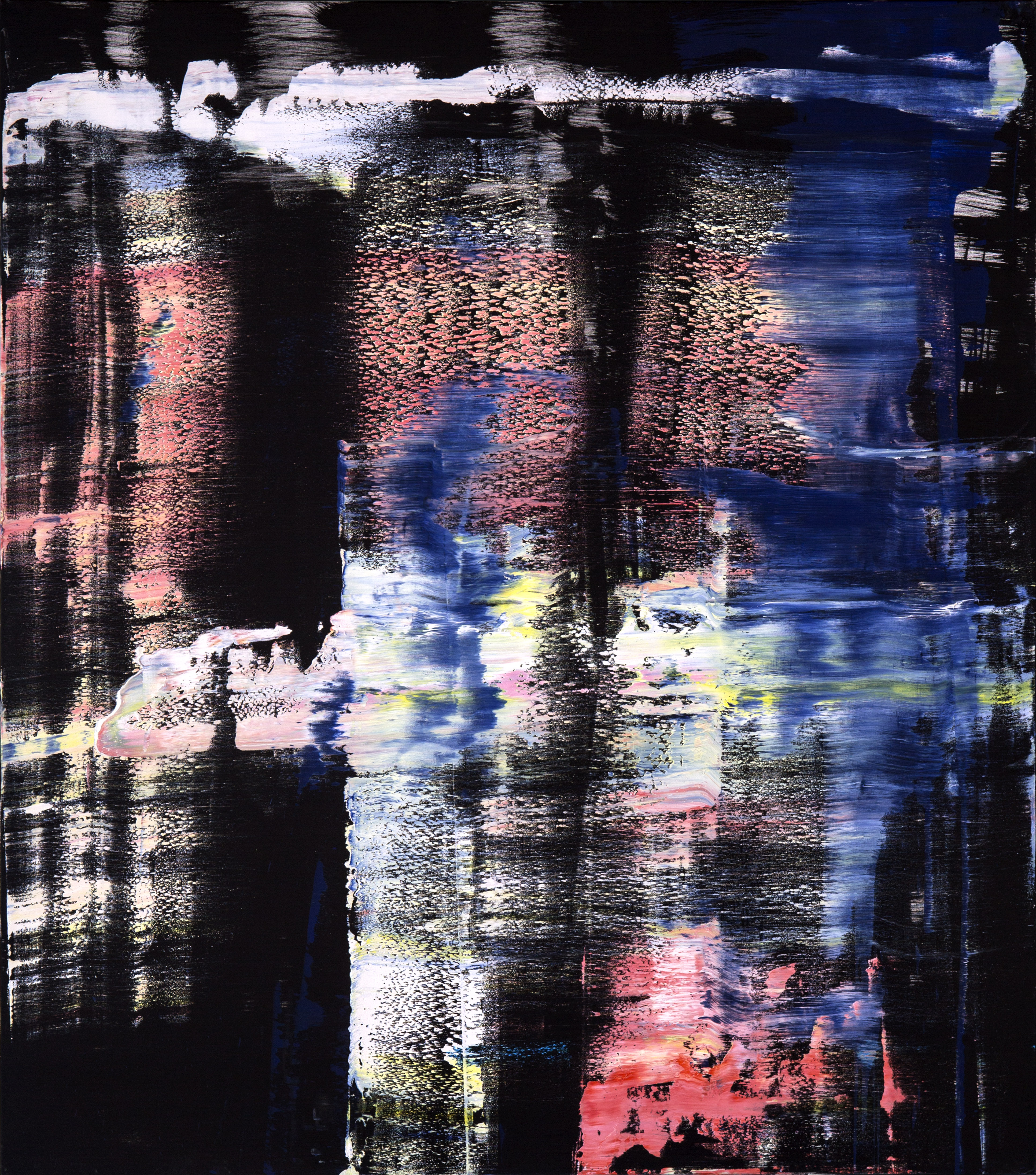 obraz